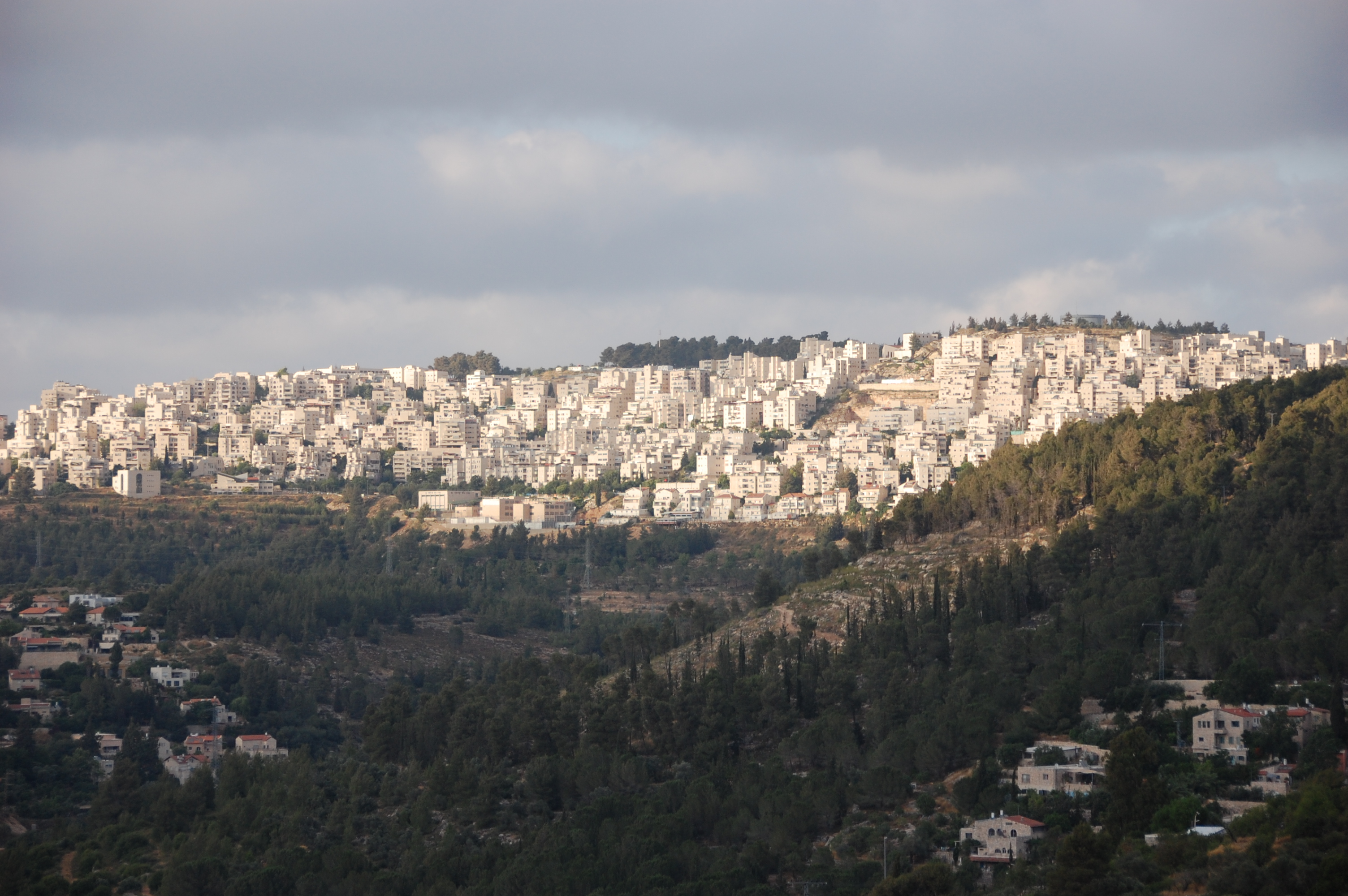 har nof, jerusalem